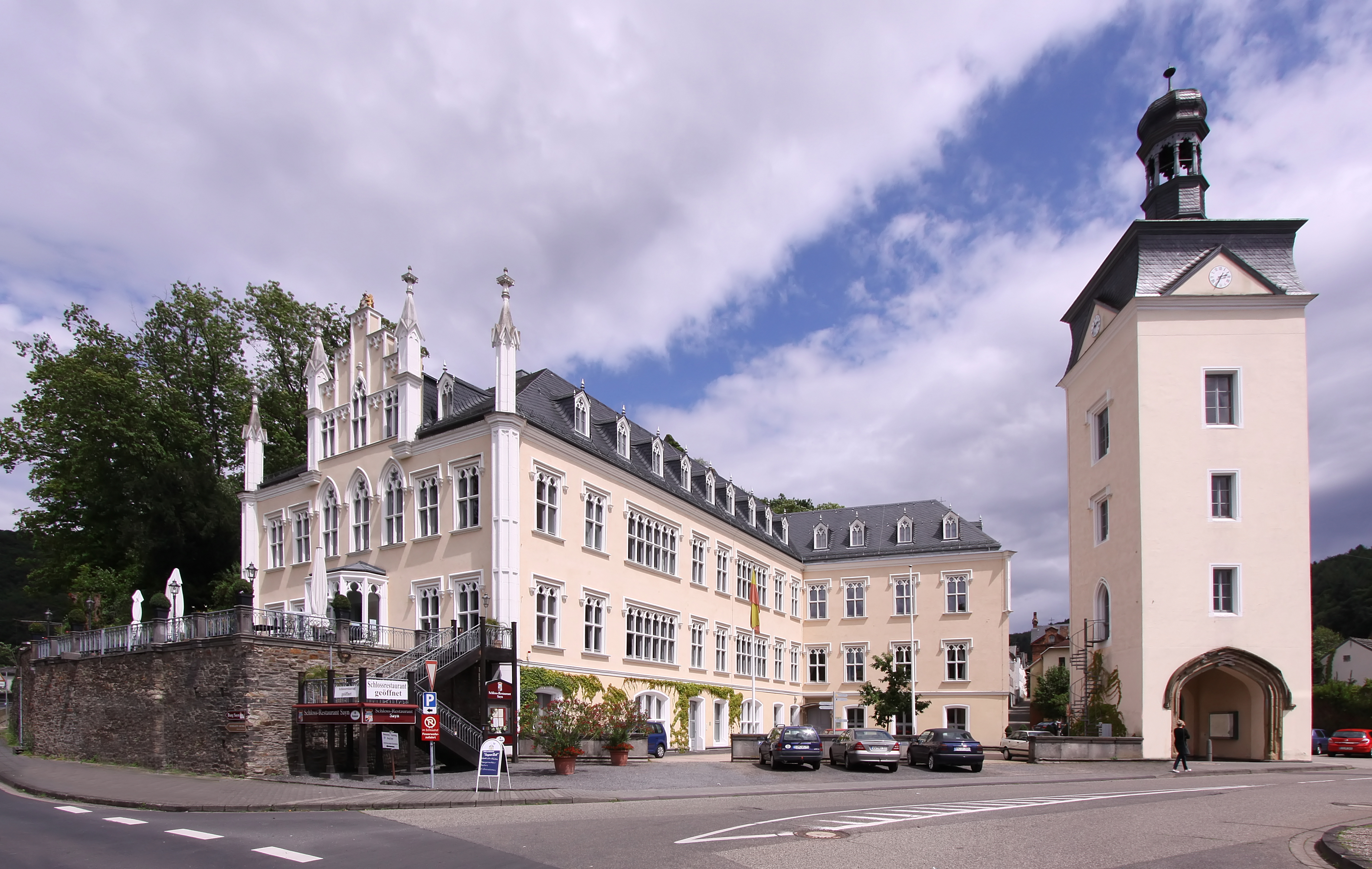 Schloss Sayn in Bendorf-Sayn bei Koblenz/Deutschland